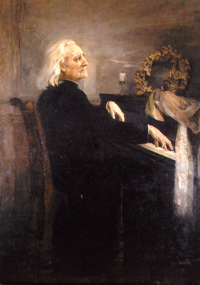 Liszt Ferenc a zongoránál Ransonnet-Villez Eliza, báró, gróf Nemes Nándorné (1843–1899) festőművész alkotása (1879).